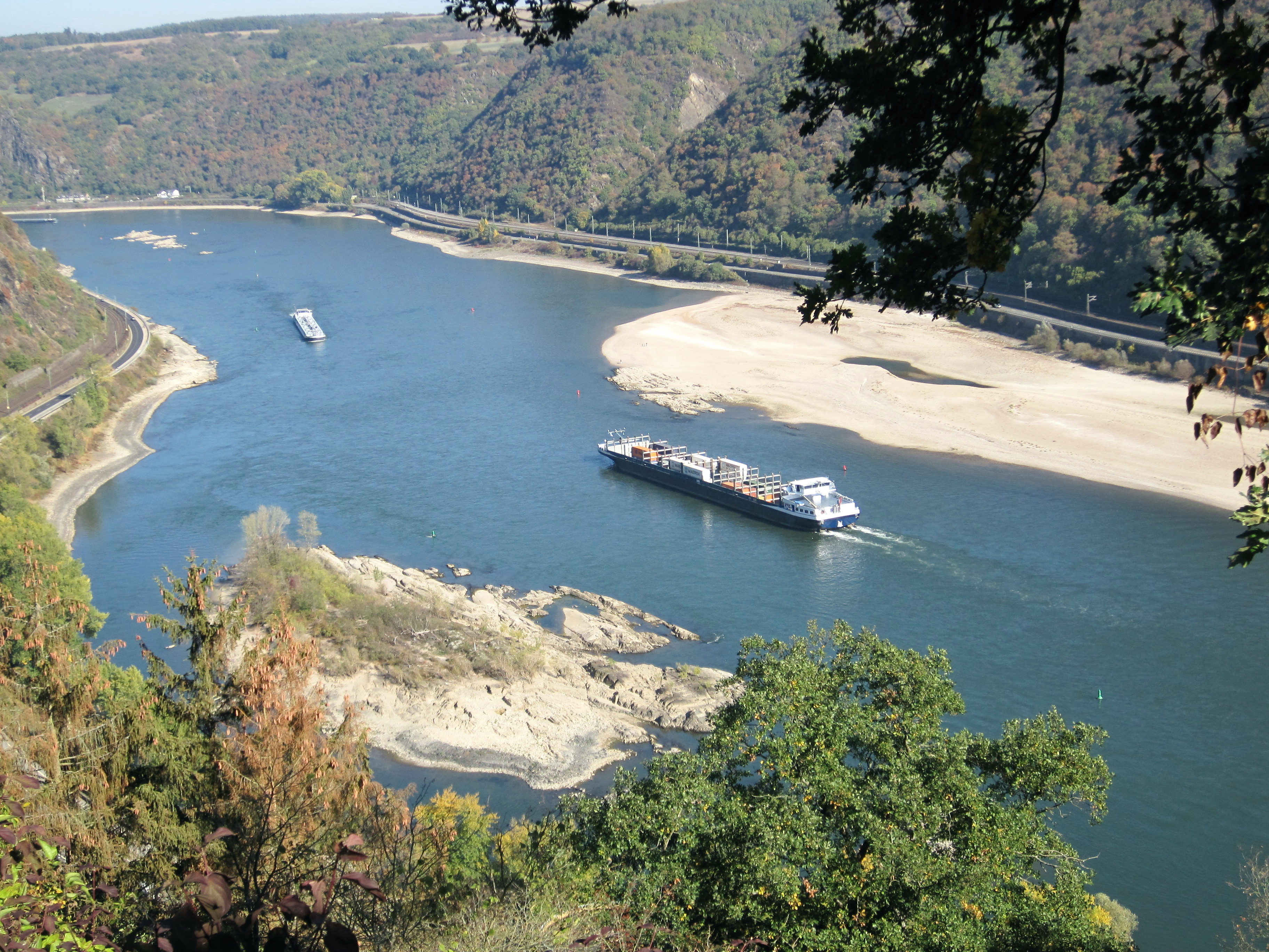 Tauber Werth (im Vordergrund auf der linken Rheinseite) und Jungferngrund bei Niedrigwasser des Rheins im Oktober 2018, Rheinkilometer 551. Blick vom Günderode-Haus in Oberwesel.